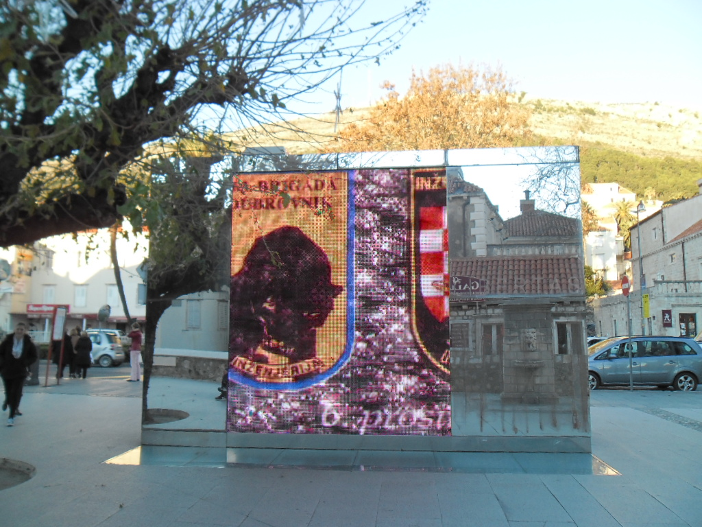 spomenik dubrovačkim braniteljima na Pilama